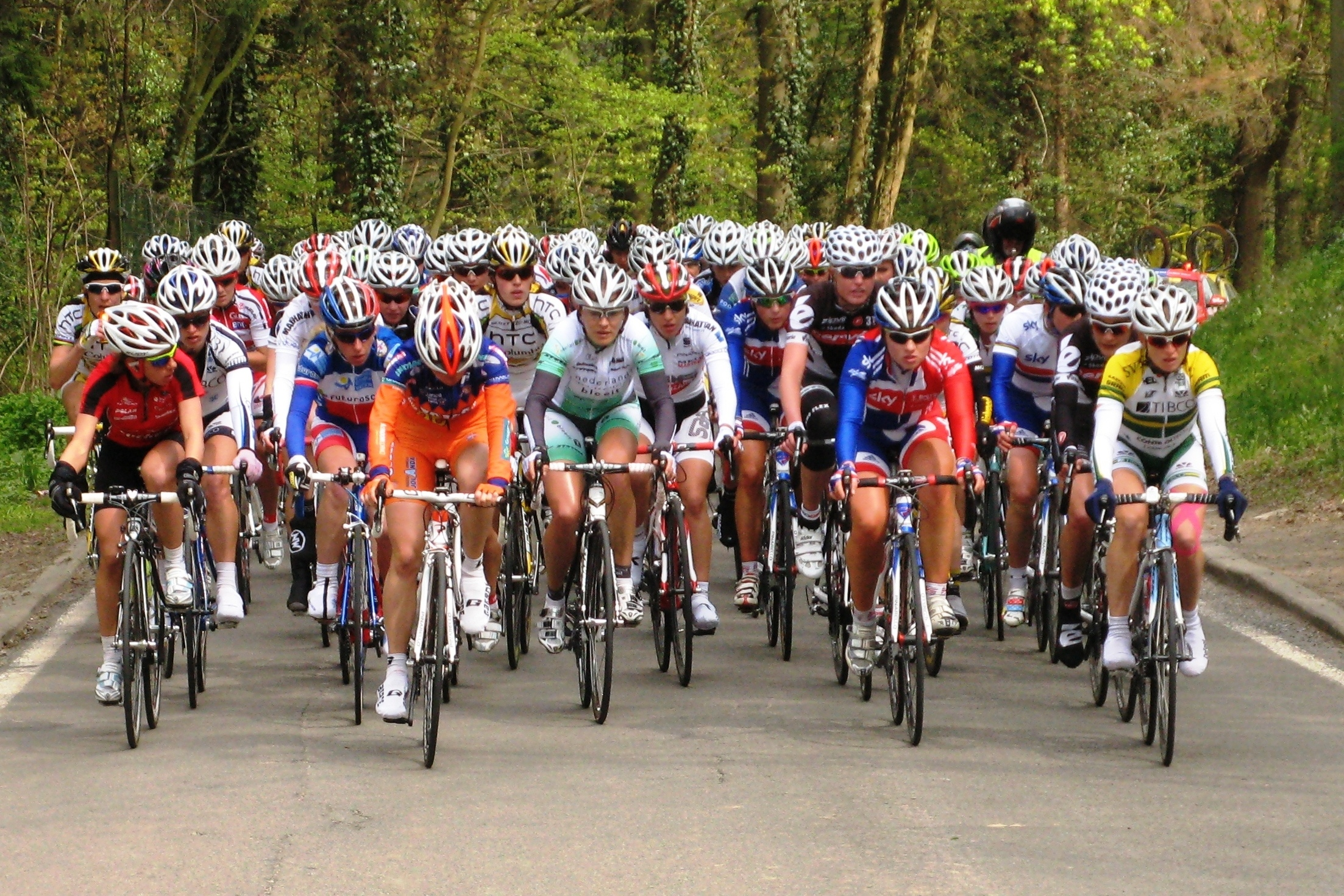 Le peloton des dames lors de La Flèche Wallonne féminine 2010 dans la côte de Ben Ahin.